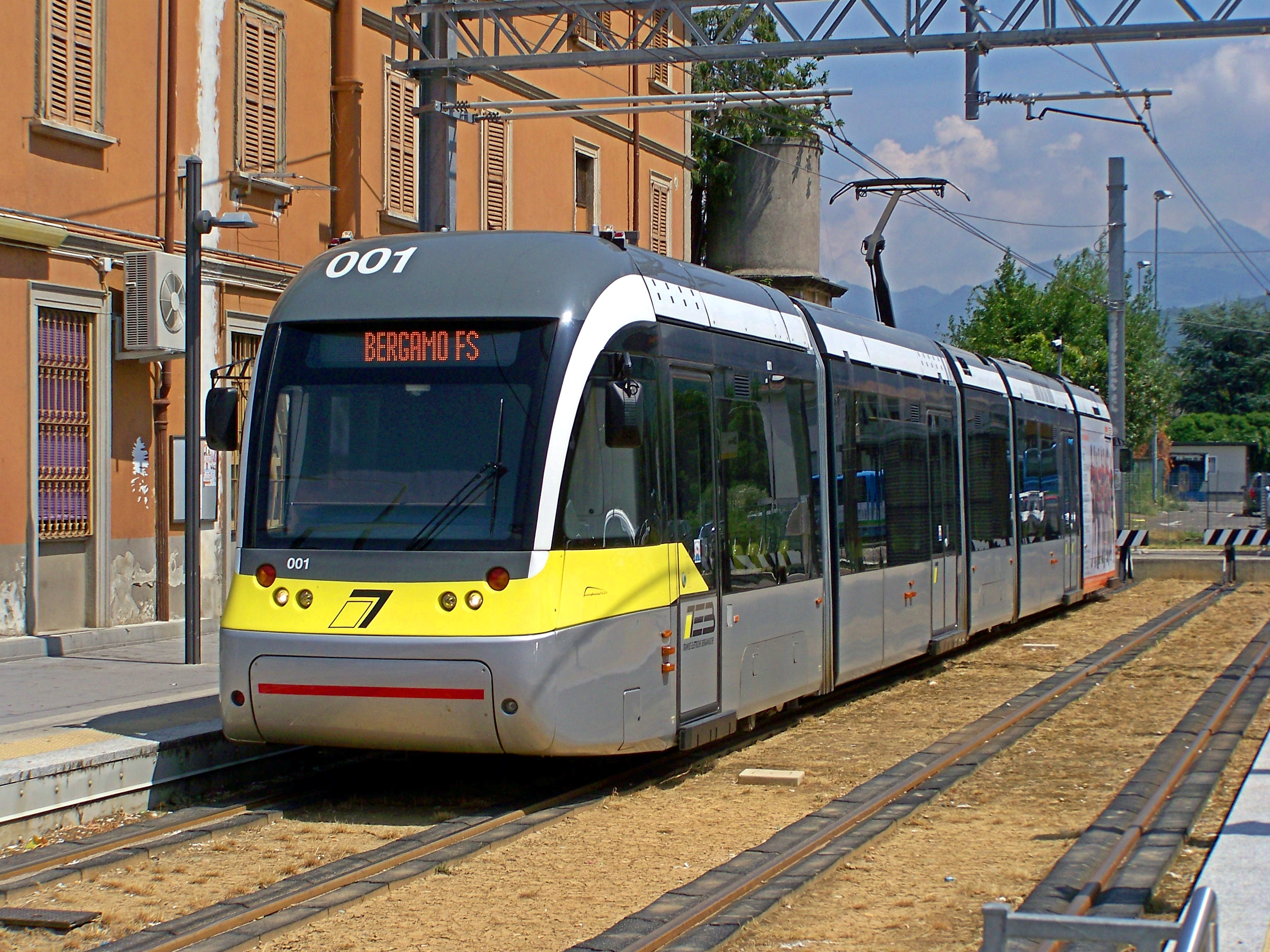 L'AnsaldoBreda Sirio TEB 001 in sosta presso il primo binario della stazione tranviaria di Albino in attesa di ripartire per Bergamo FS